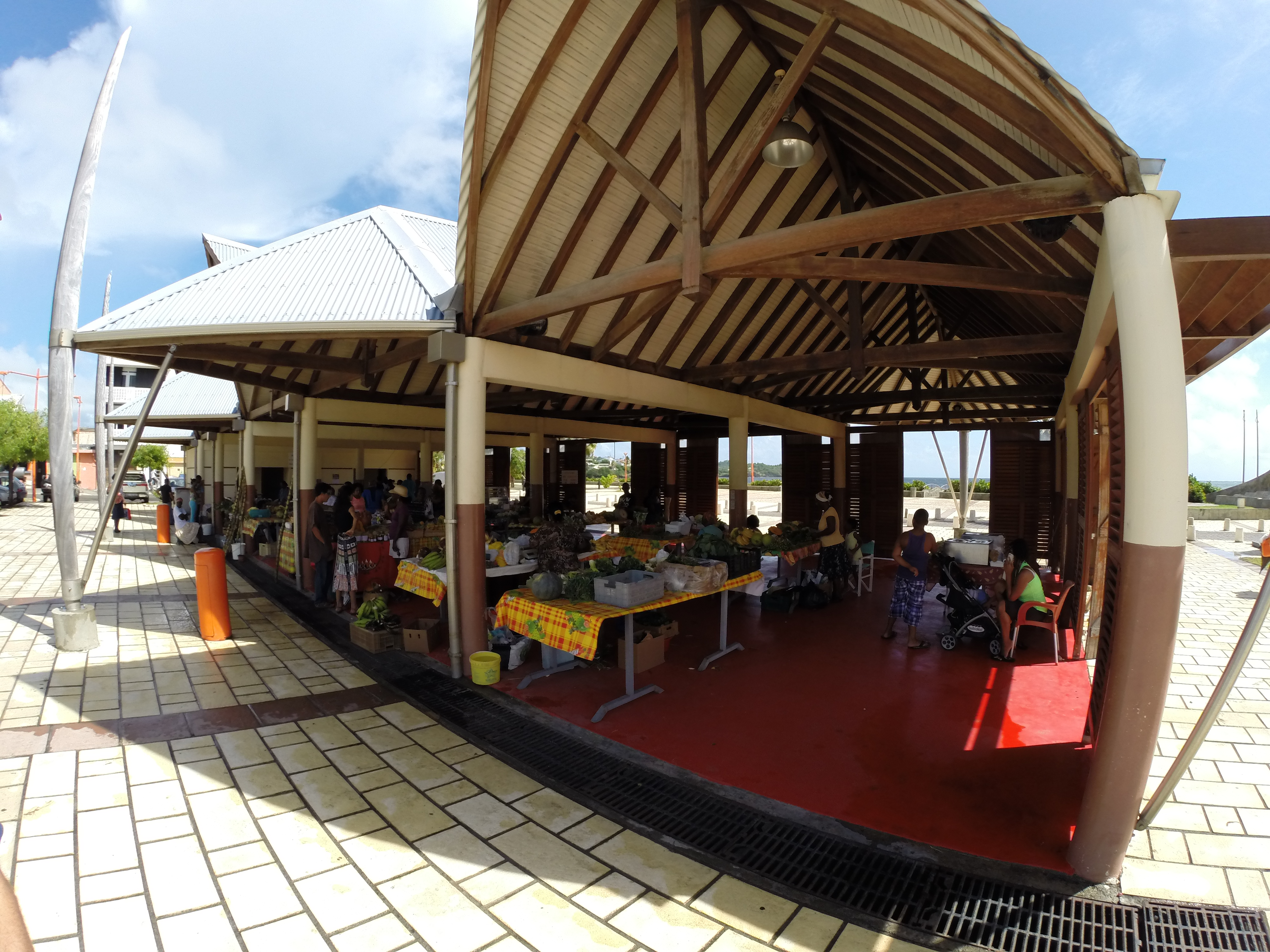 Photo du marché aux fruits et légumes du Vauclin (Martinique). Située en plein coeur du bourg du Vauclin, le marché est l'un des points de rencontre du bourg.